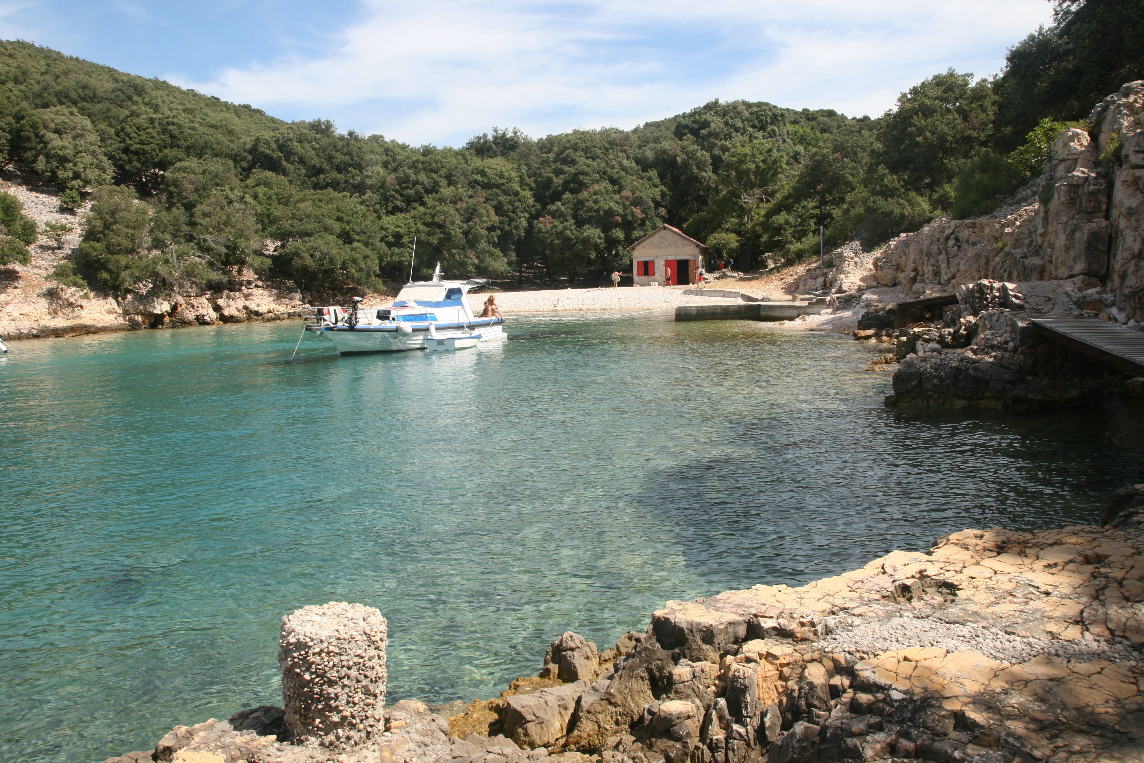 Cala della Corsia, isola di Plauno; Scattata dal piccolo molo della baia della Corsia